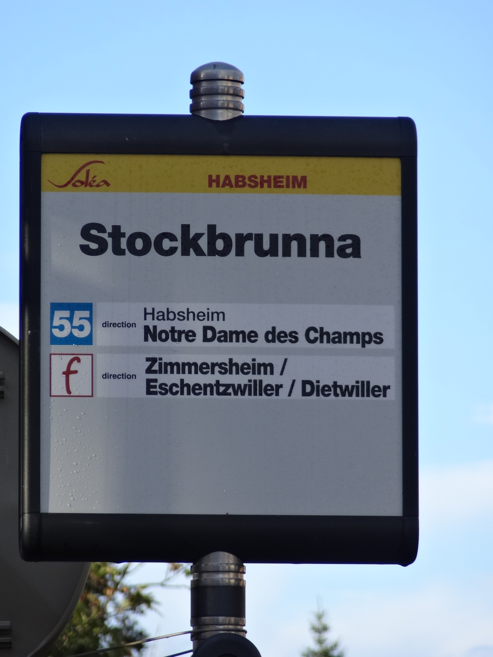 Arrêt de bus Soléa "Stockbrunna", à Habsheim (Alsace), à l'emplacement d'une ancienne fontaine ("Brunna" en alsacien).